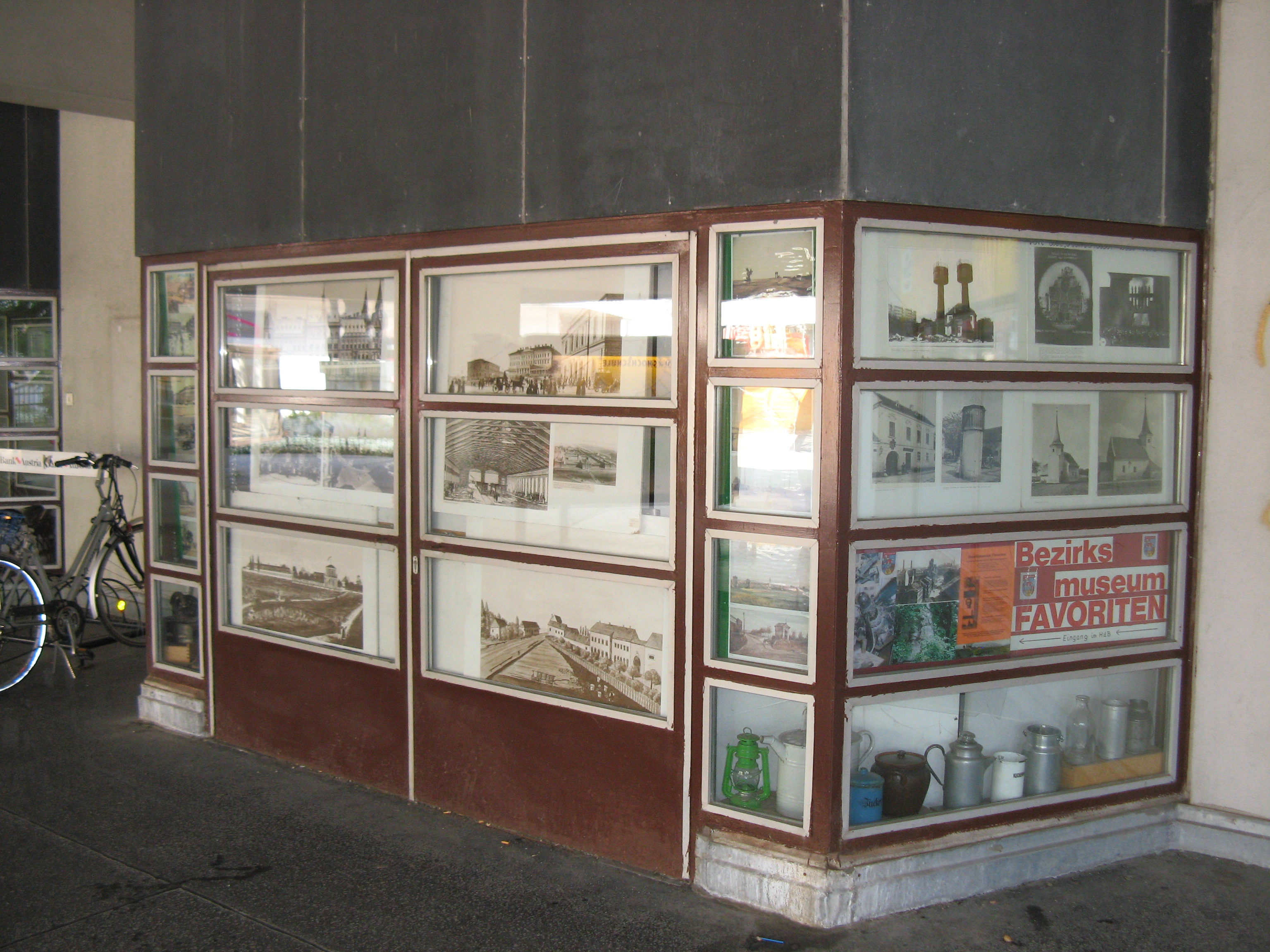 Bezirksmuseum Favoriten, Ada-Christen-Gasse 2C, Wien-Favoriten